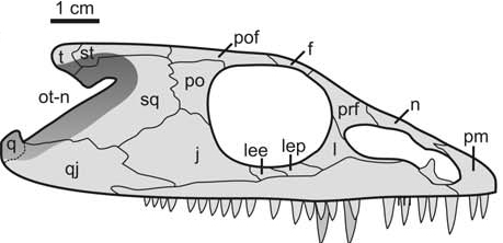 Phonerpeton skull